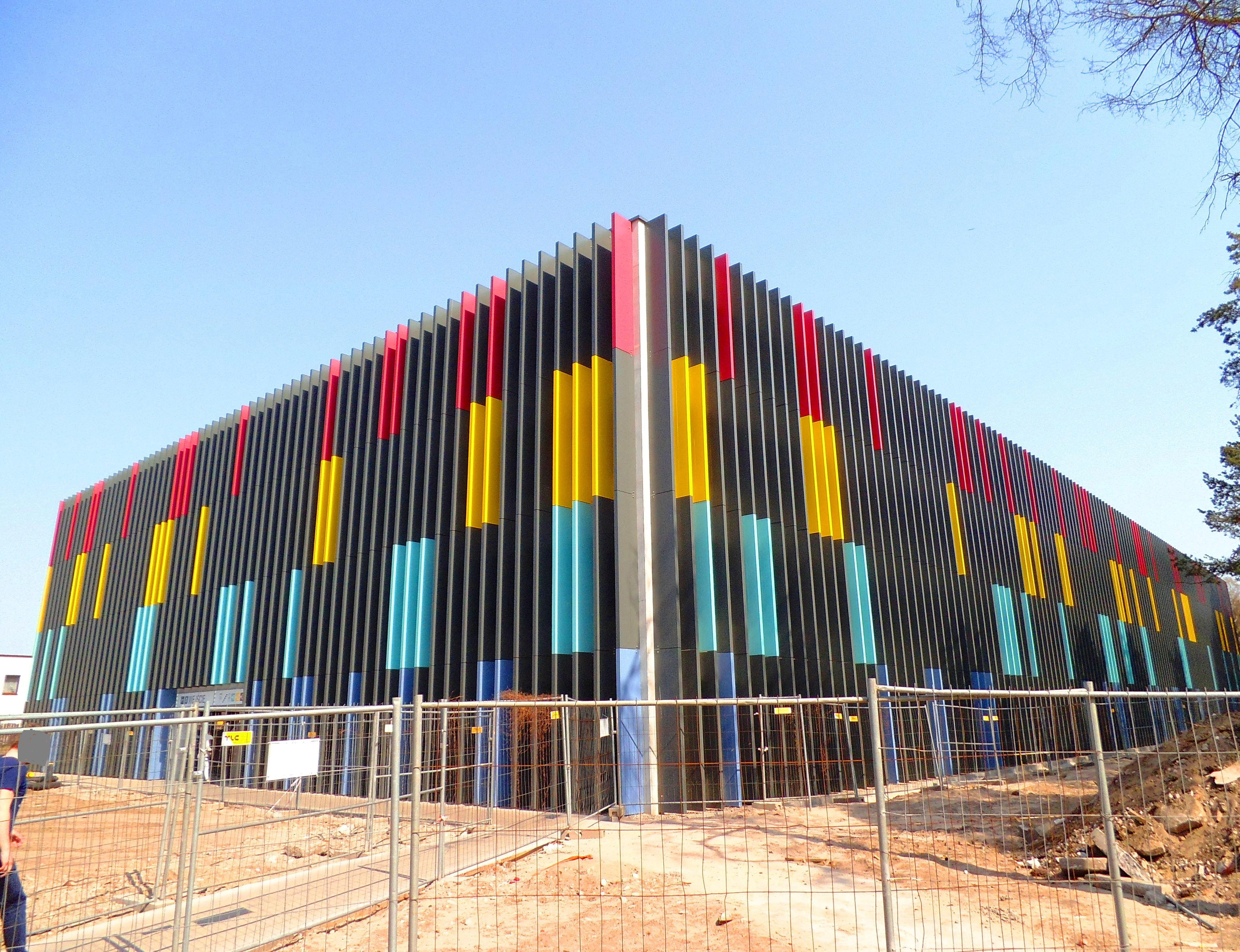 Czteropoziomowy parking przy WSZ w Toruniu, kwiecień 2018 rok